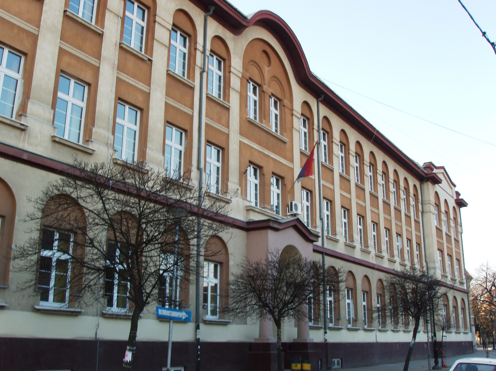 Budova gymnázia ve Sremské Mitrovici.